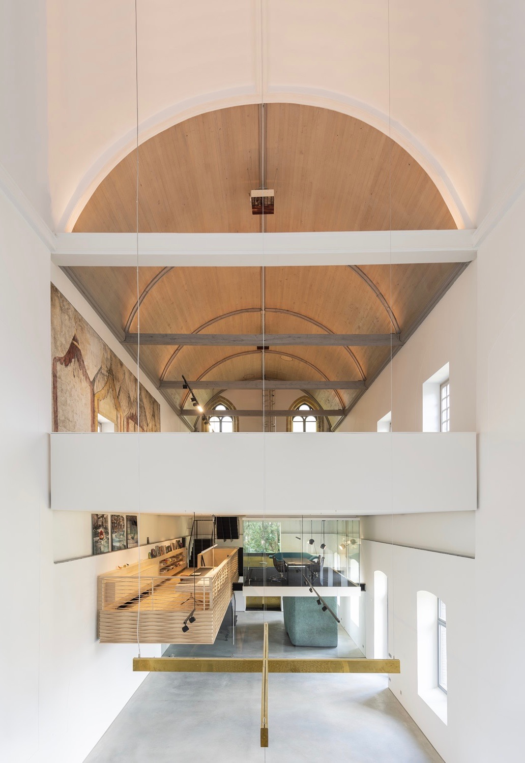 Te zien is het nieuwe interieur van de laat gotische Andrieskapel (1362) te Maastricht met de teruggeplaatste bovenvloer (dubbelkapel) en de drie nieuwe units; glazen vergaderruimte, kopergroene sanitairunit, en zwevend houten kantoorblok.